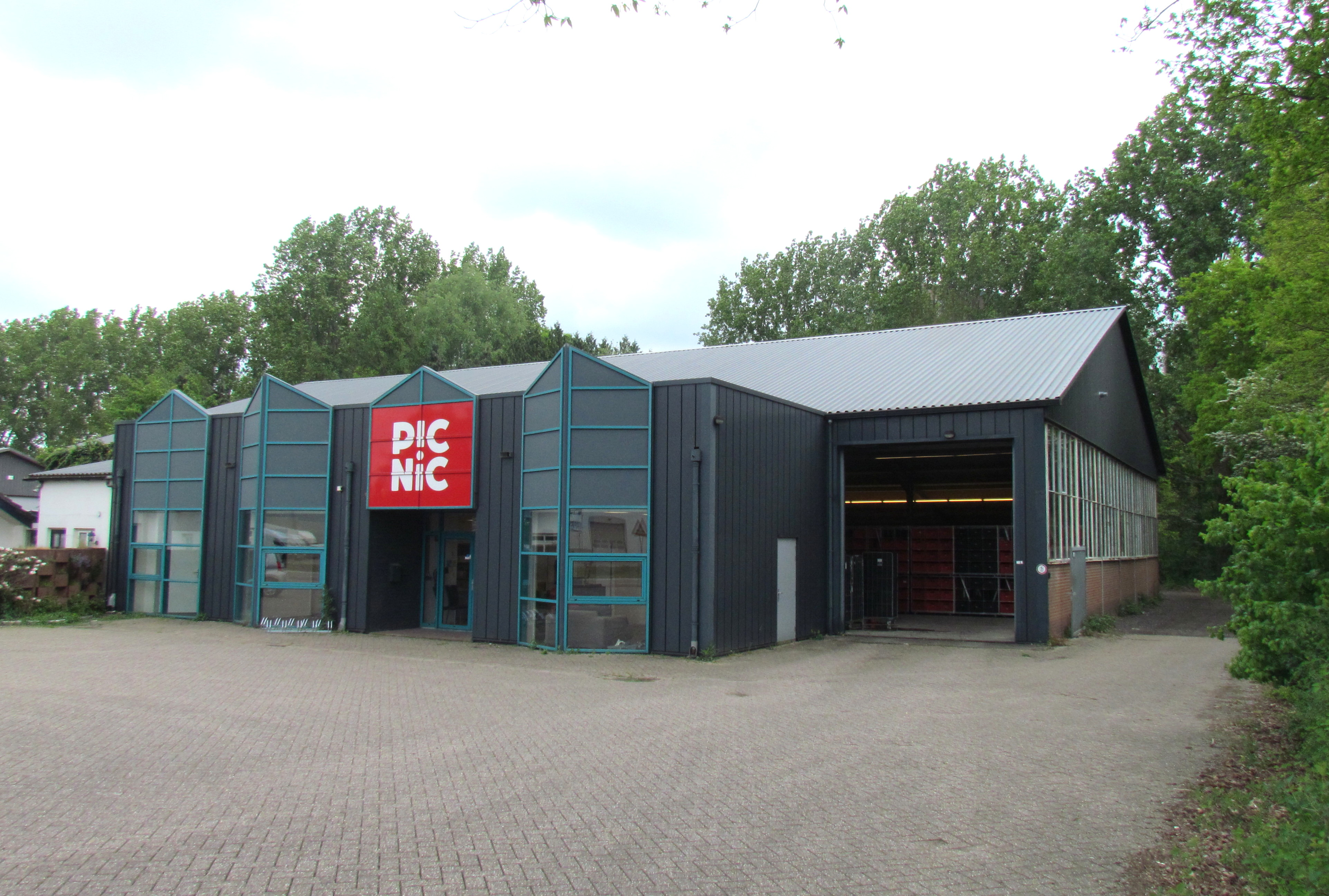 Magazijn van online supermarkt Picnic in Apeldoorn (NL)